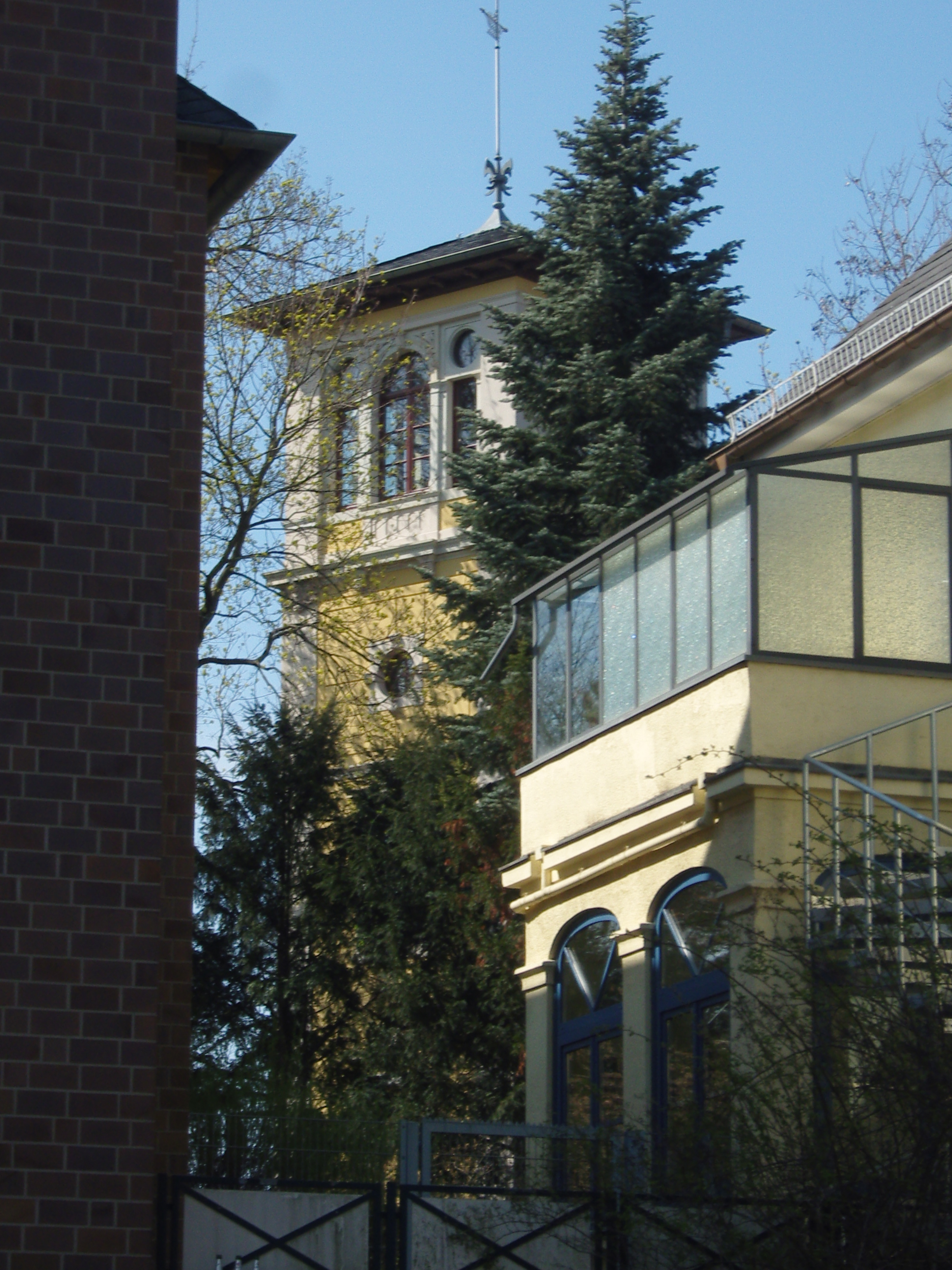 Denkmalgeschützte Villa Trinkl, erbaut von den Gebrüder Ziller, Großenhainer Straße 241 in Dresden-Trachau